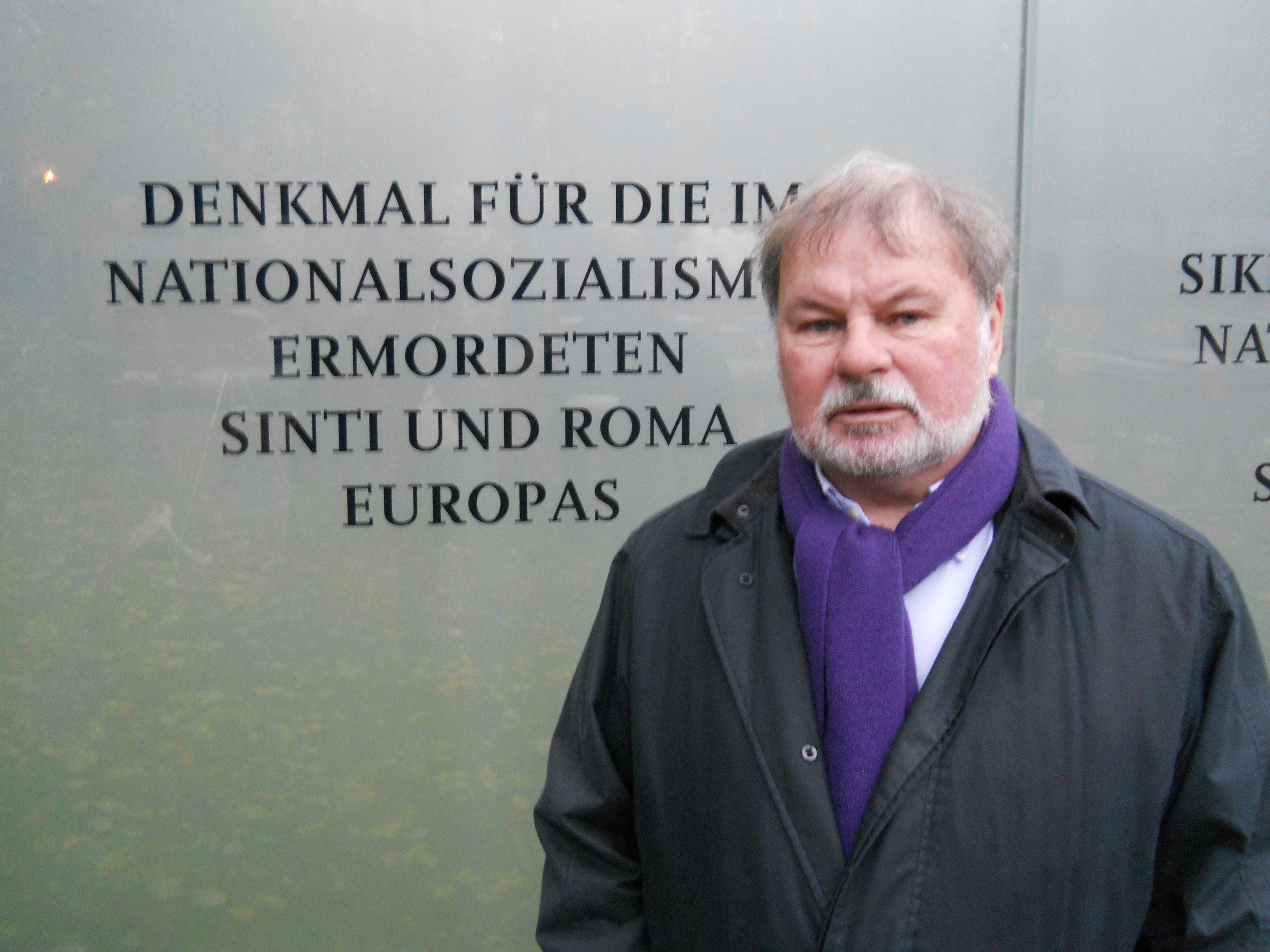 Aad Wagenaar in Berlijn, bij de onthulling van het monument voor de omgekomen Sinti en Roma.